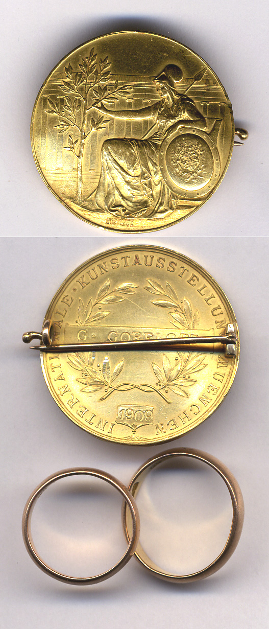 Из автобиографии художника Горелова Гавриила Никитича: "В 1908 г. была присуждена мне 1 премия за картину "Осмеяние еретиков", которая в 1909 году на Международной выставке в Мюнхене удостоена золотой медали, за нее же в 1910 году на Весенней выставке получена 1 премия имени А.И. Куинджи."(с) Фотографии (сканы) медали Горелова Г.Н. и обручальных колец Горелова Г.Н. и Гореловой Т.Н. предоставлены внуком художника Гореловым Максимом Юрьевичем для свободного использования всеми желающими.